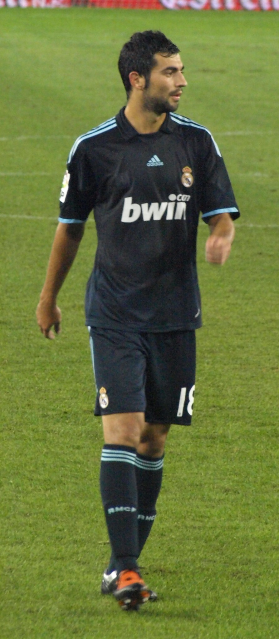 Raúl Albiol en el partido que enfrentó al Real Madrid con el RCD Español en el Estadio de Cornellá-El Prat de la primera vuelta de La Liga 2009/10.